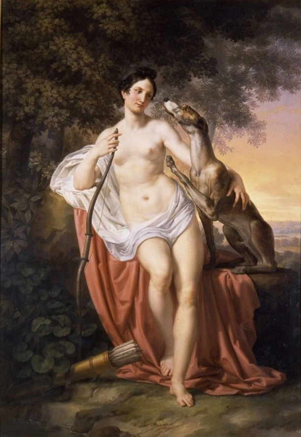 Diana cacciatrice by Pelagio Palagi